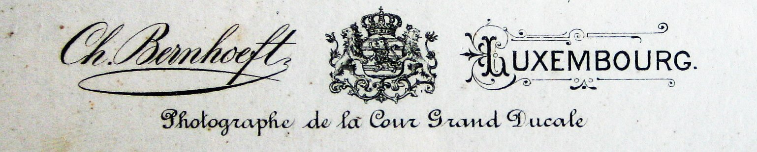 Sujet: Signatur/Opdrock um Passe-partout vun enger Foto vum Charles Bernhoeft (gebuer den 22. Juli 1859 a gestuerwen de 7. Februar 1933). Auteur: fir d'Reproductioun